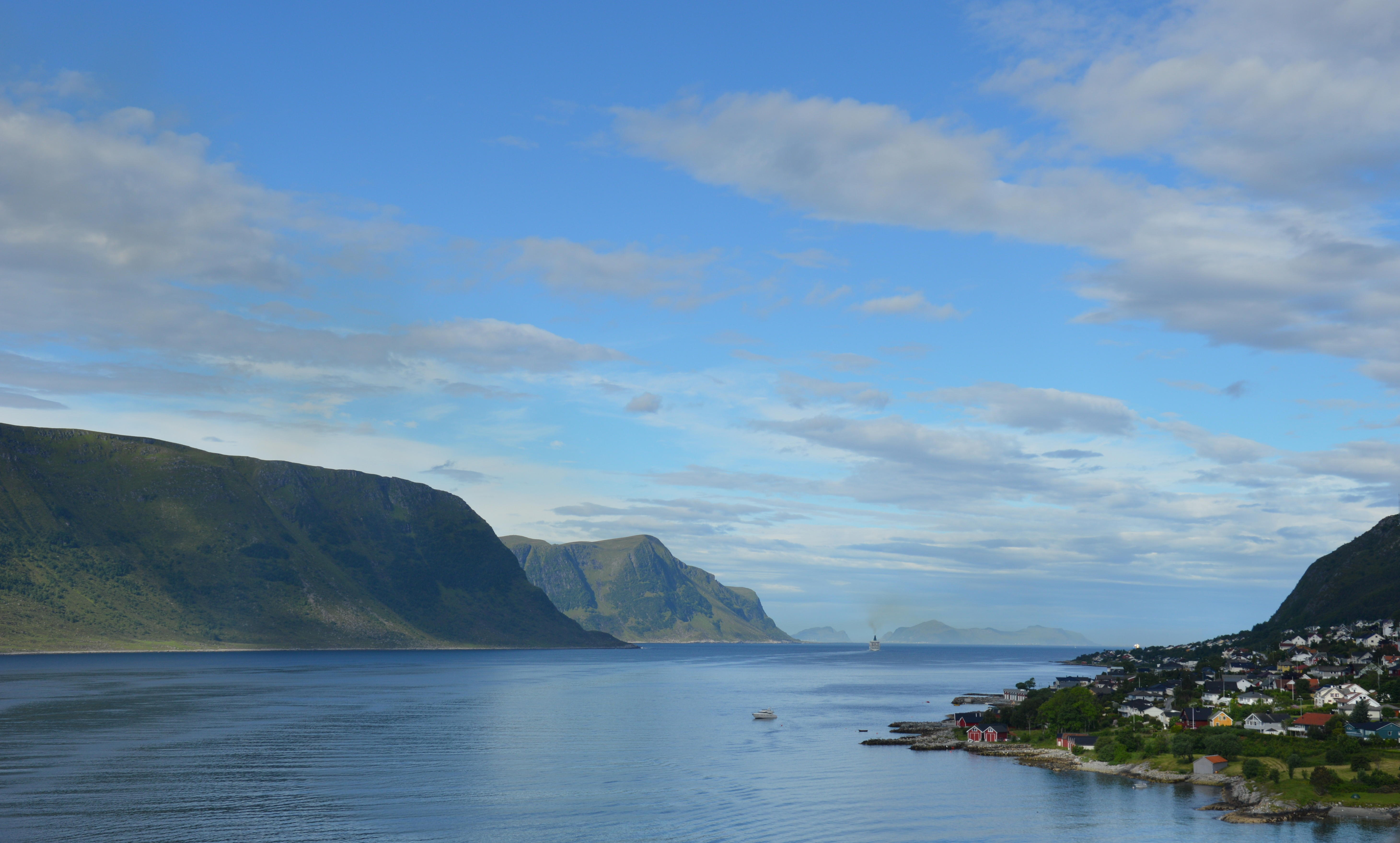 Heissafjorden bei Alesund in Norwegen